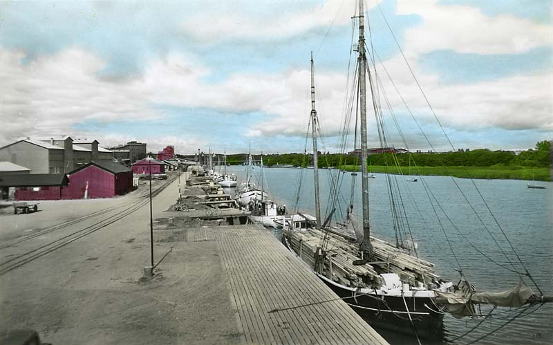 Hamnen. Handkolorerad variant av ac00577. Motiv: Falkenberg Nyckelord: Riksintressen Kategori: Hamnmiljöer Hamnen. Handkolorerad variant av ac00577.